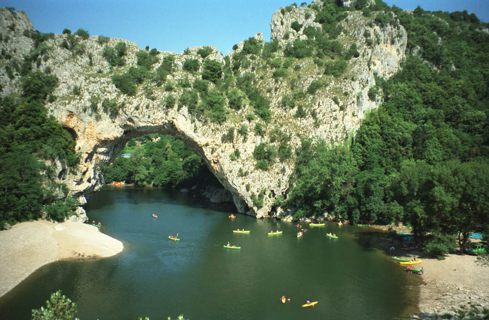 Pont d'Arc an der Ardèche, fotografiert im Frühjahr 1996 von Bernd Gehrmann, Lizenz: GFDL